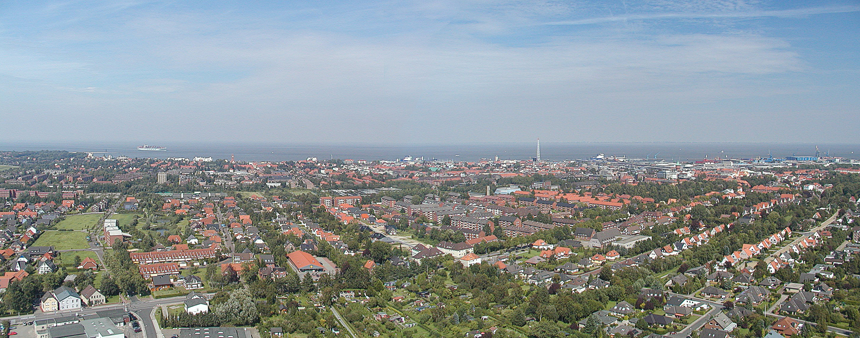 Cuxhaven Panorama klein